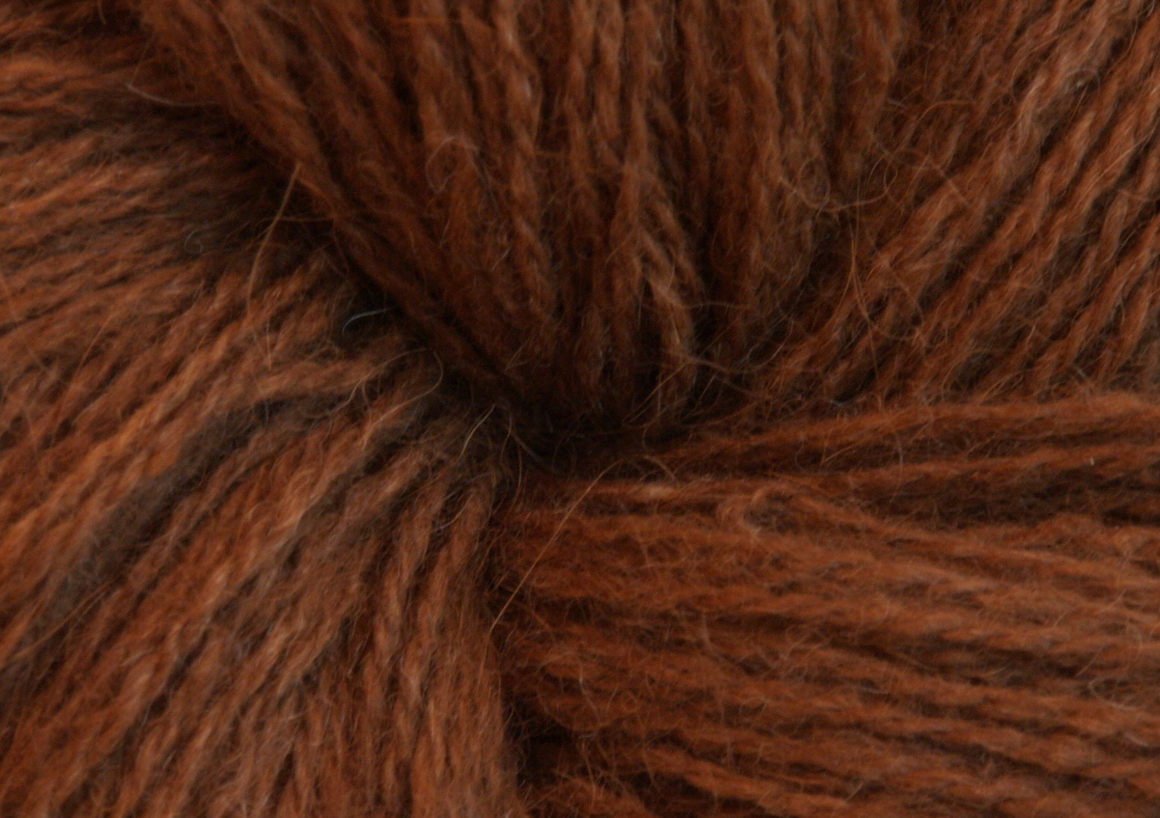 Handspun llama yarn from Patagonia